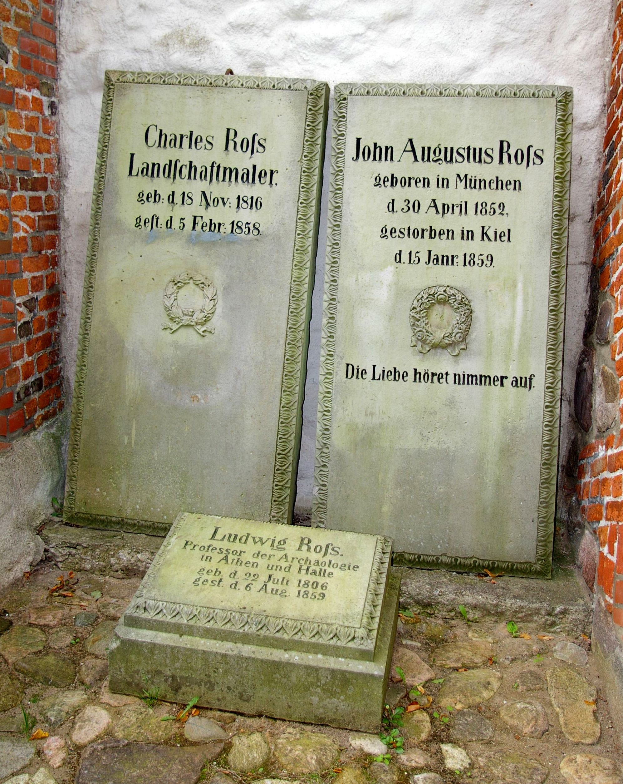 Grabsteine von Ludwig Ross und Charles Ross